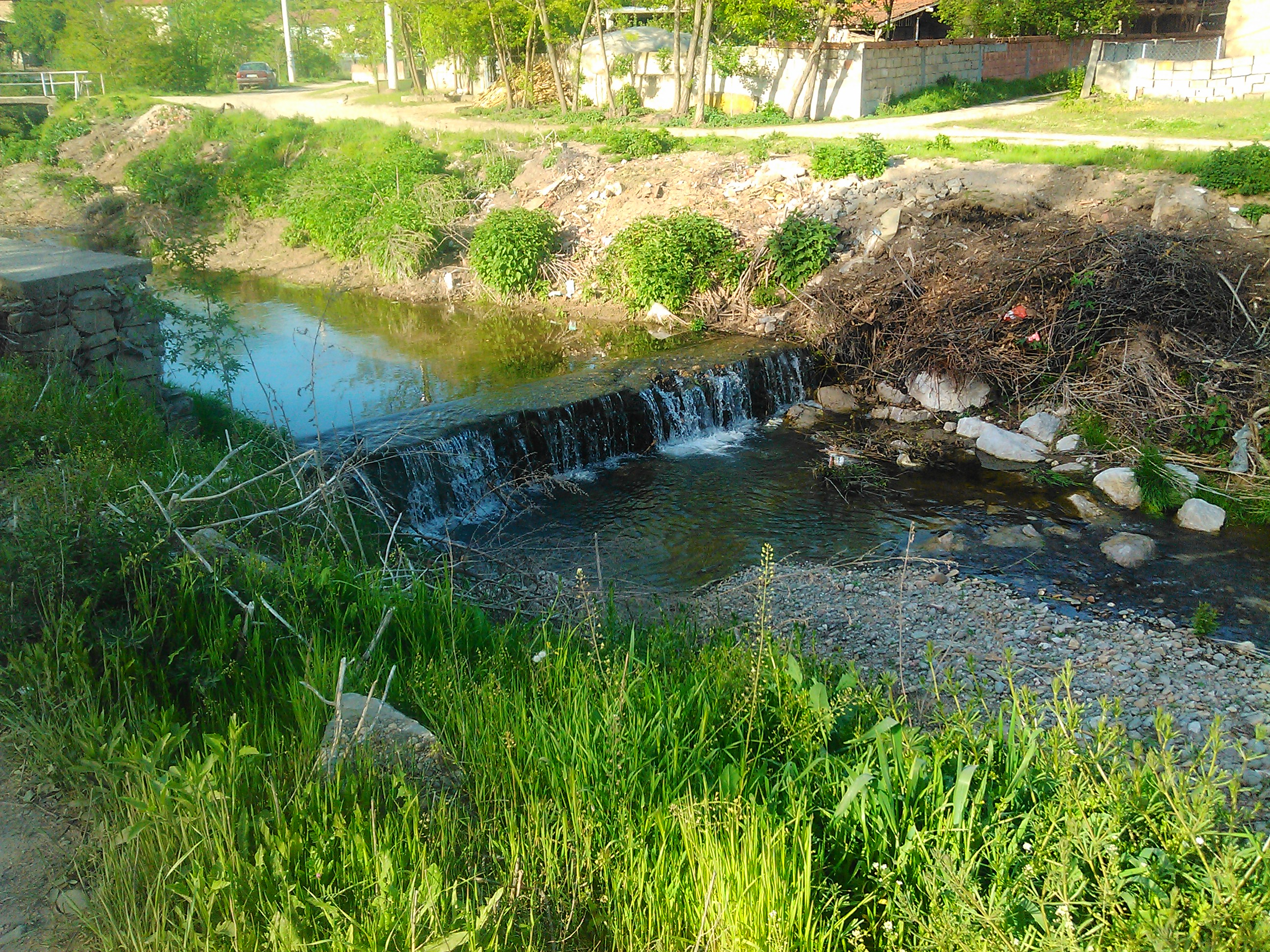 Srpski (latinica): Stupnička reka